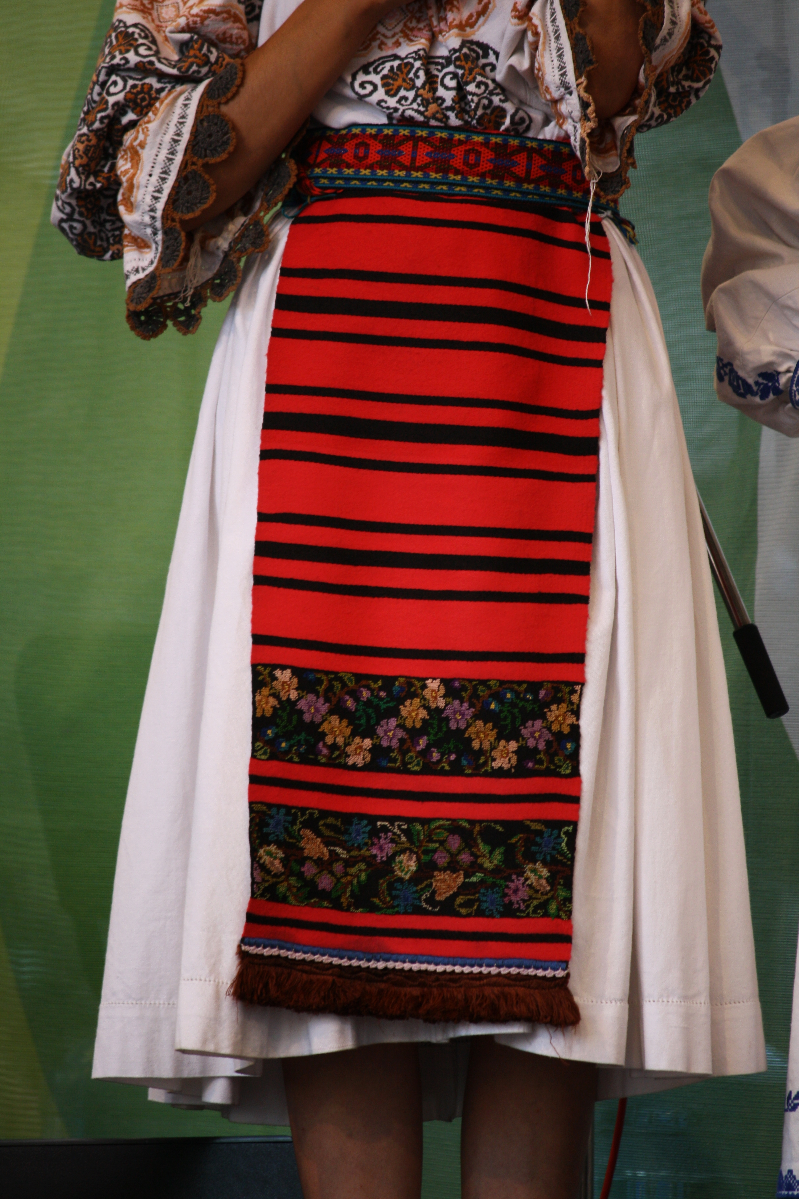 Pražský jarmark 2011 - z vystoupení rumunské folklórní skupiny Doina Somesana